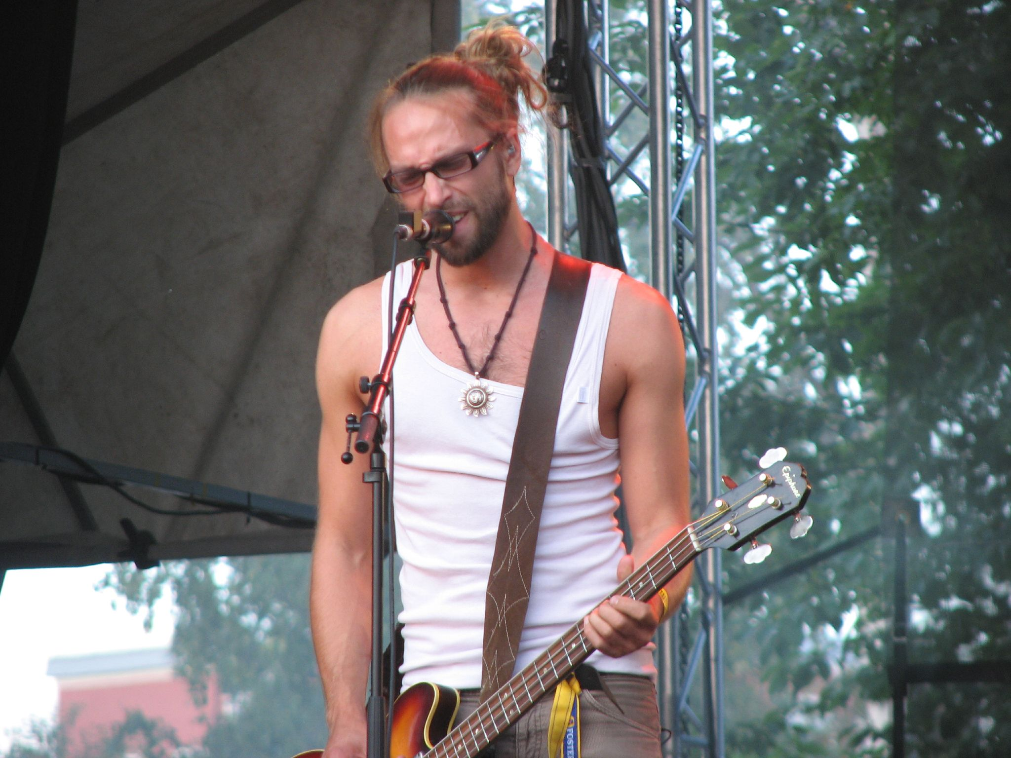 Jonne von Hertzen at Qstock 2007